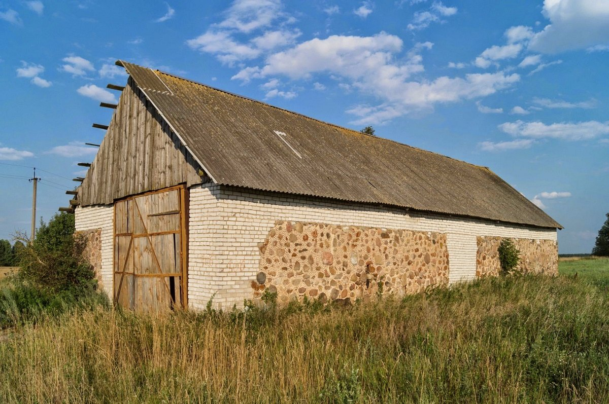 Клесіна. Гаспадарчая пабудова